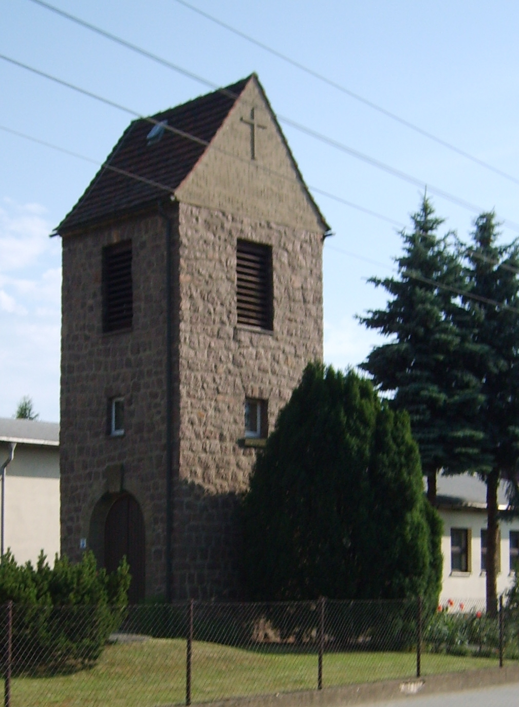 Der Glockenturm in Merzdorf im Landkreis Elbe-Elster